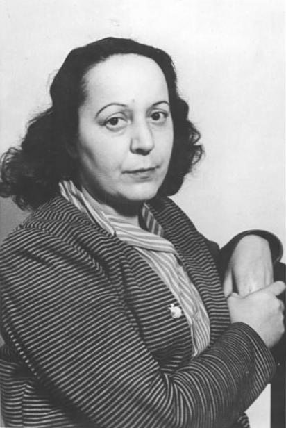 Zentralbild Hesse 6.1.1969 Prof. Lea Grundig Malerin und Grafikerin. Präsidentin des Verbandes Bildender Künstler Deutschlands, Nationalpreisträgerin. Aufnahme 1951